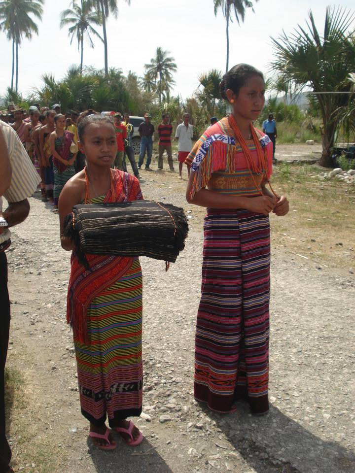 Fatuberlio, Manufahi